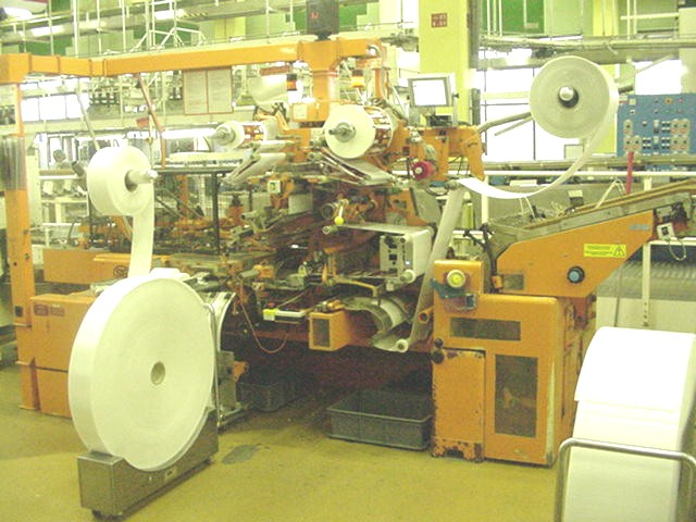 Photo personnelle prise par mes soins lundi 16 octobre 2006 Machine d'empaquetage SIG type GRA 100 uitlisant dane les entreprises agroalimentaires